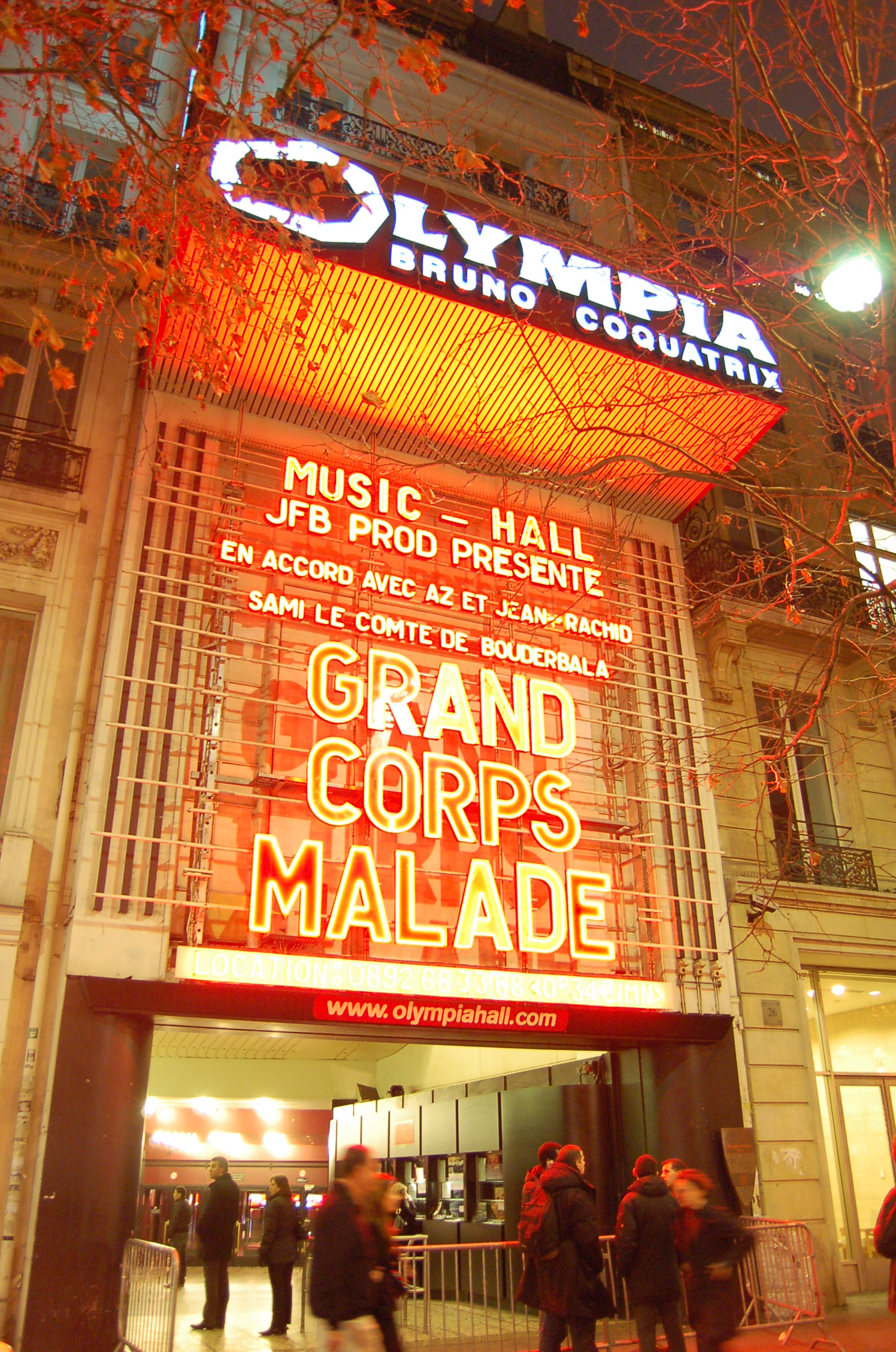 L'Olympia, Paris 9em, France, Dalida film pre premiere